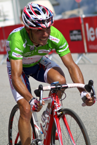 Joaquim Rodriguez